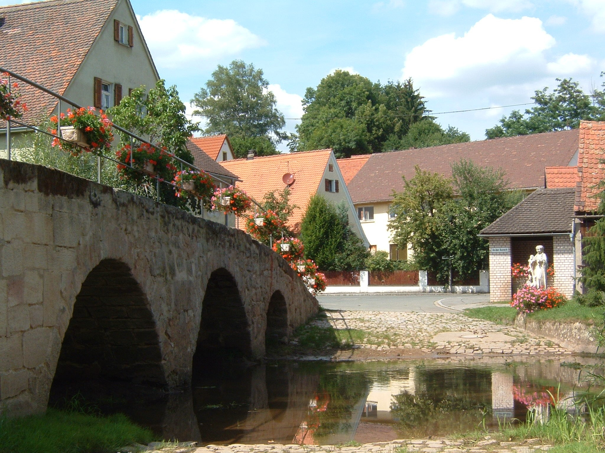 Das Bild zeigt die alte Brücke über das Flüsschen Aurach in Barthelmesaurach. Sonstiges: Die Gemeinde Kammerstein hat mir das Bild mit freundlicher Unterstützung zur Verfügung gestellt und ist auch mit der Veröffentlichung im Internet etc. einverstanden.